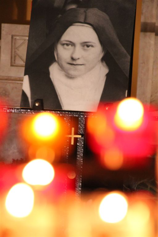 Portrait de Sainte-Thérèse à l'intérieur de la Basilique de Lisieux